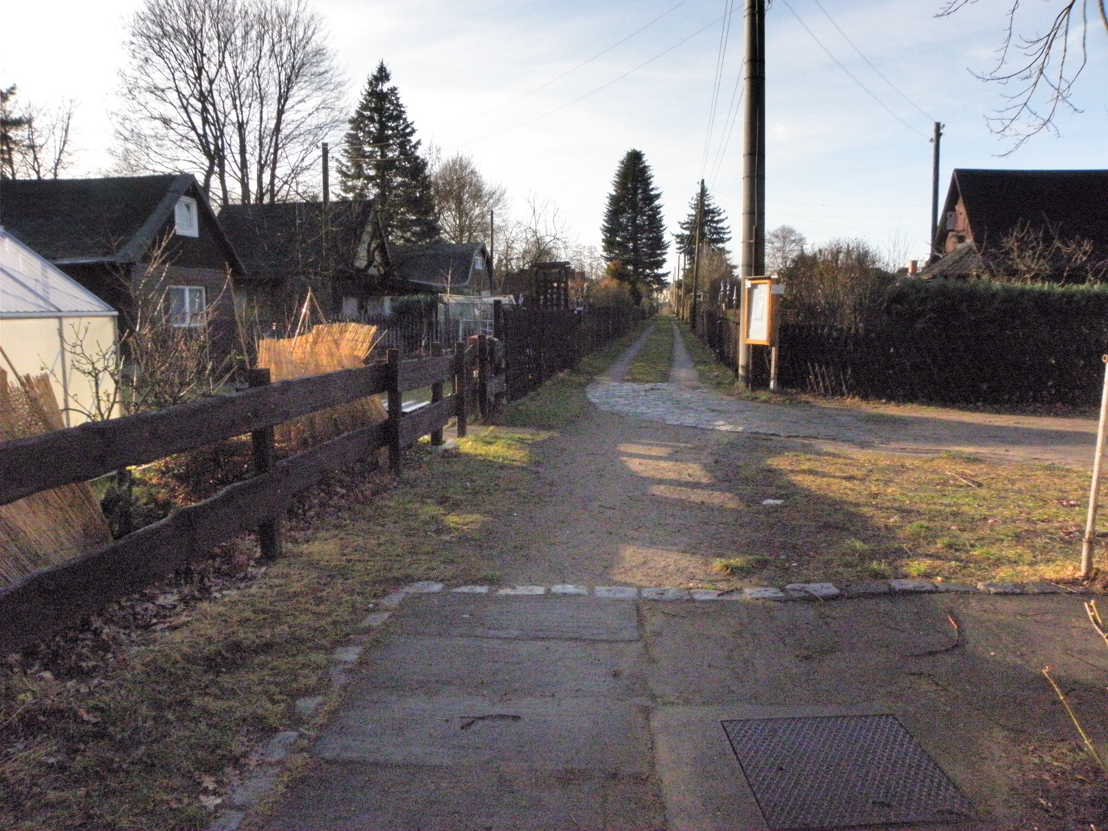 Straße in Berlin-Köpenick: Wendenschloßstraße, Kleingartenanlage Wendenaue II